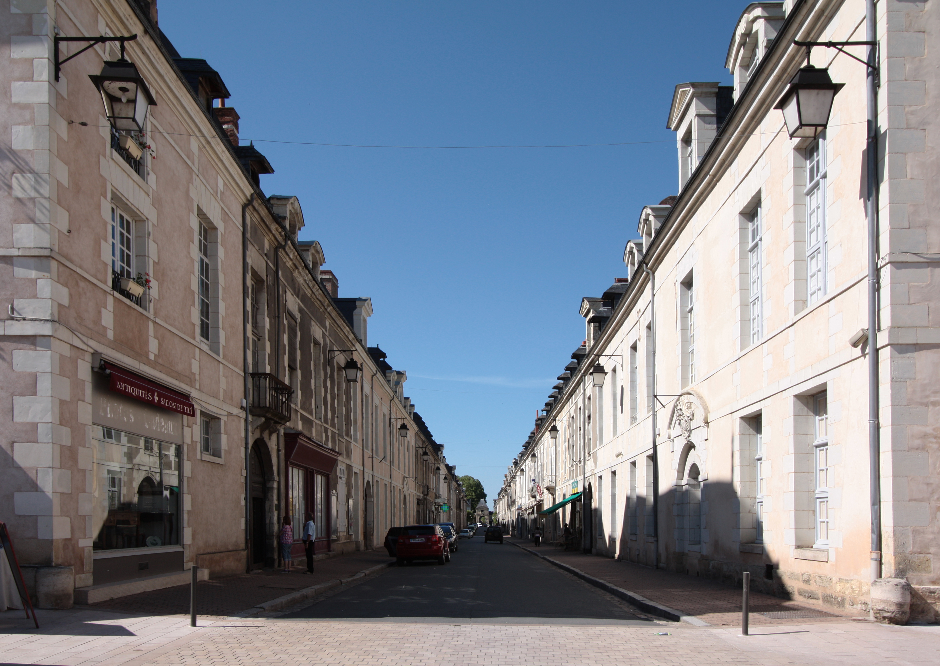 Richelieu, Stadt im Département Indre-et-Loire/Frankreich - Grande Rue, Blick vom Zentrum der Stadt, Place Cardinale (heute: Place des Halles et de l'Eglise), zum nördlichen Stadttor.